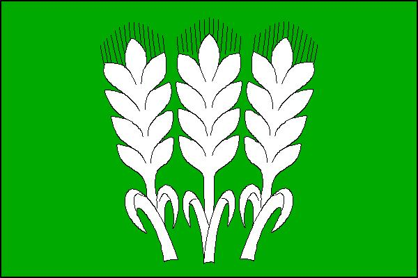 Vlajka obce Janovice